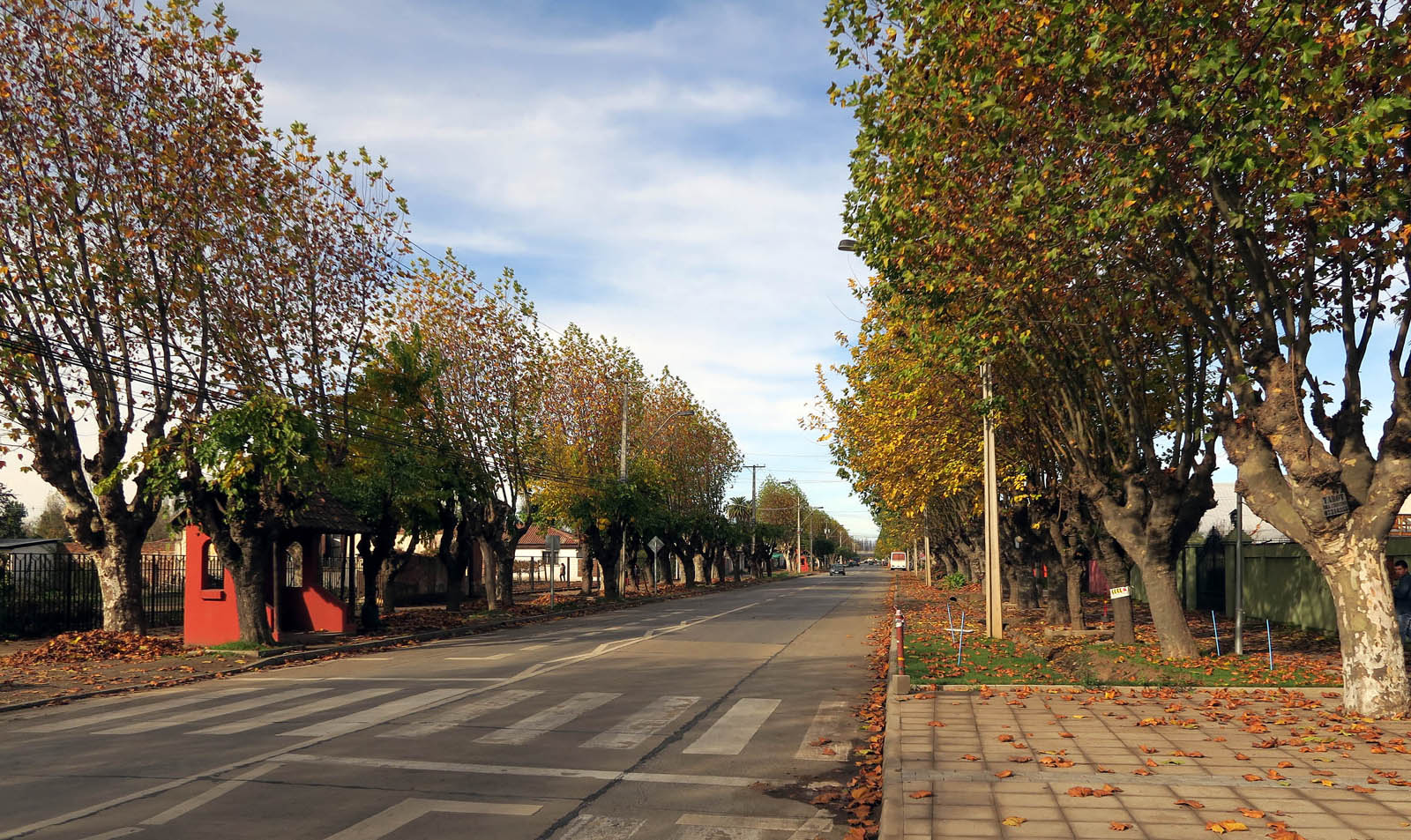 Av Balmaceda, San javier, Maule, Chile